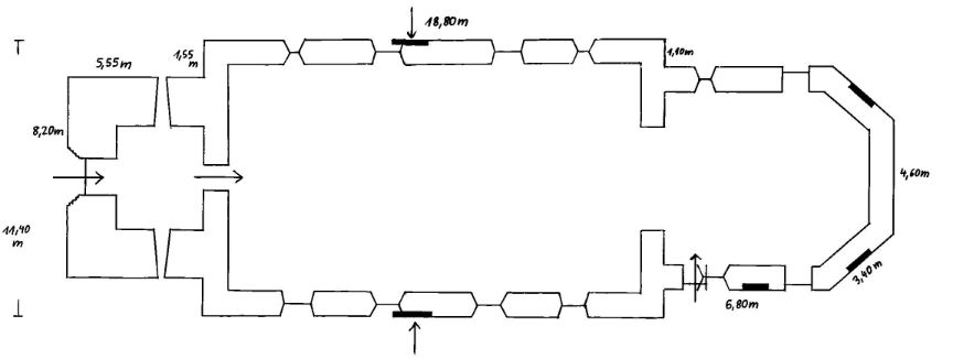 Grundriss der Dorfkirche Mörz, Gemeinde Planetal, Lkr. Potsdam-Mittelmark, Brandenburg